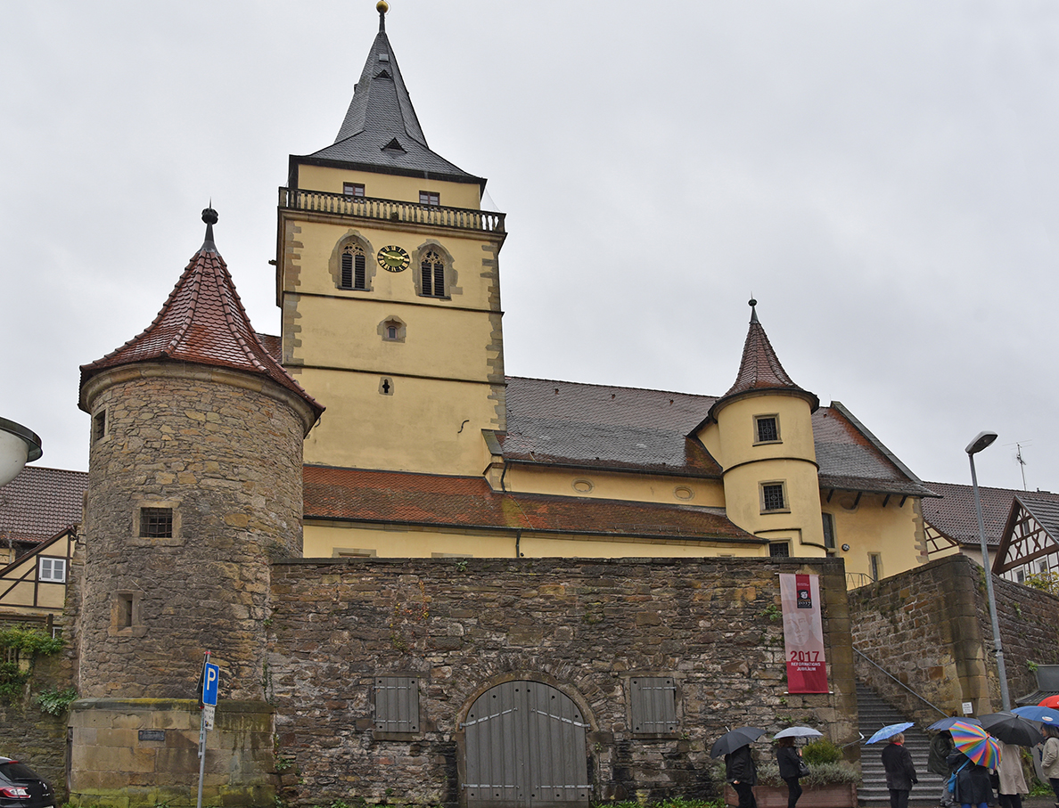 Großsachsenheimer Wehrkirche von Norden